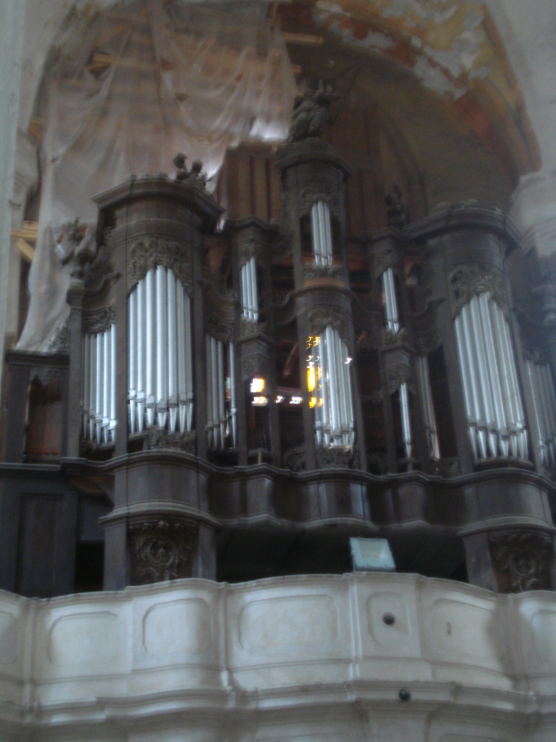 The Church of Saint Francis and Saint Bernardino in Vilnius (Šv. Pranciškaus ir Bernardino, arba Bernardinų, bažnyčia; Kościół Śww. Franciszka i Bernardyna; Maironio 10). Organ